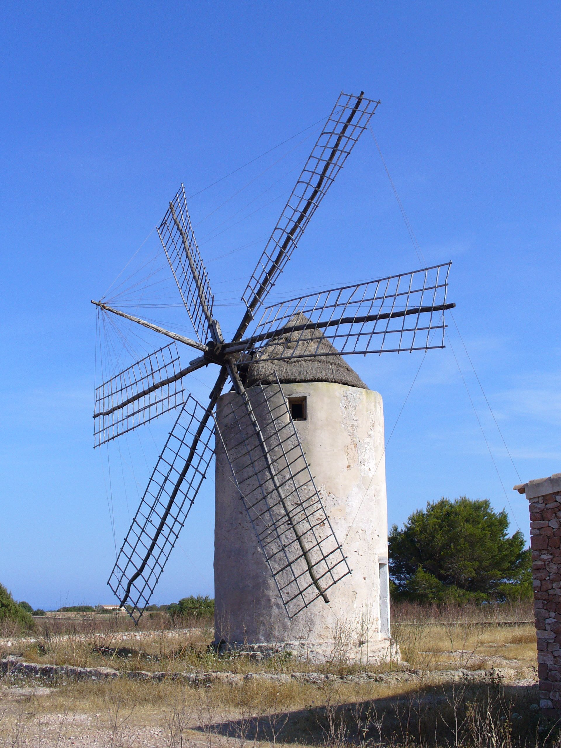 Molino junto a El Pilar de la Mola